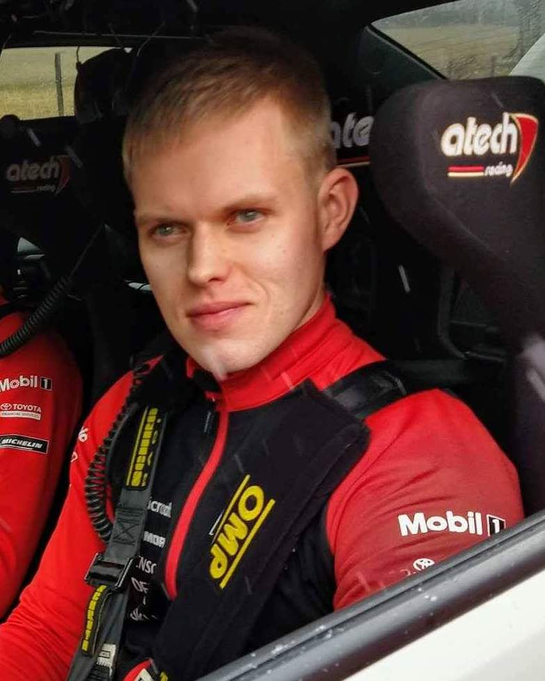 Ott Tänak durant les reconnaissances du Rallye Monte-Carlo 2019.